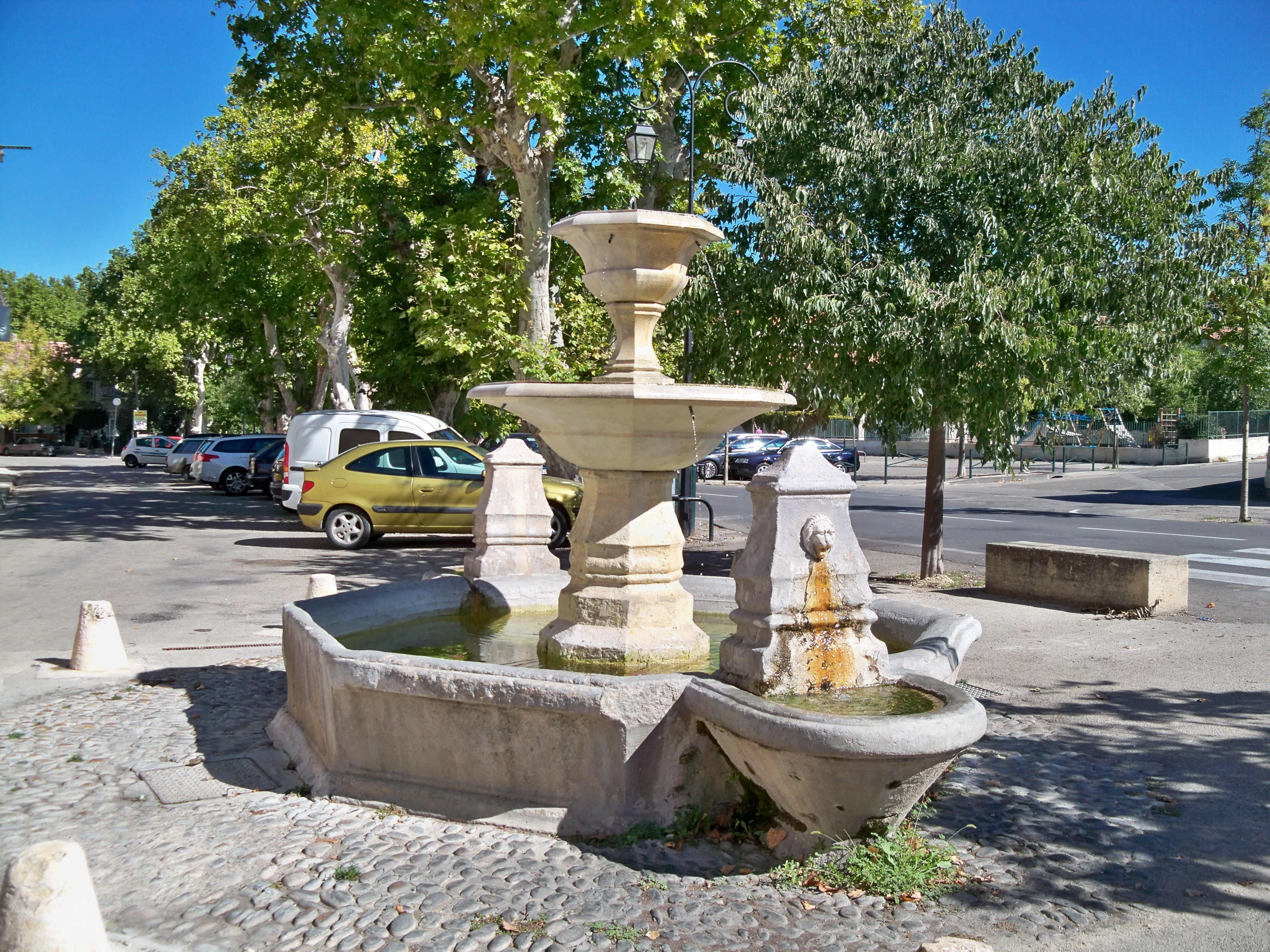 Fontaine du Cours de la République à Pernes les Fontaines (84)